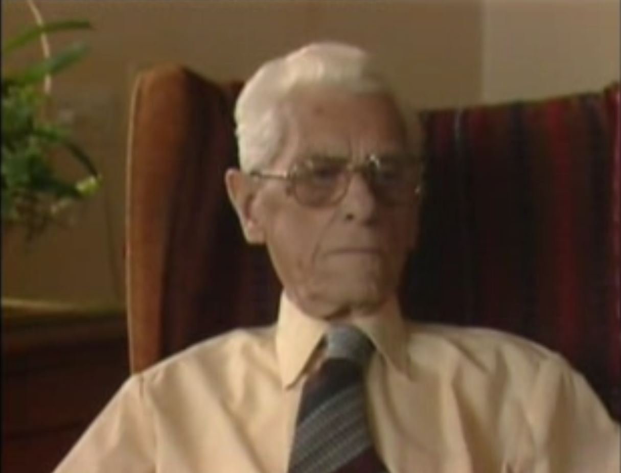 In het bejaardencentrum "de Mantel" in Leischendam